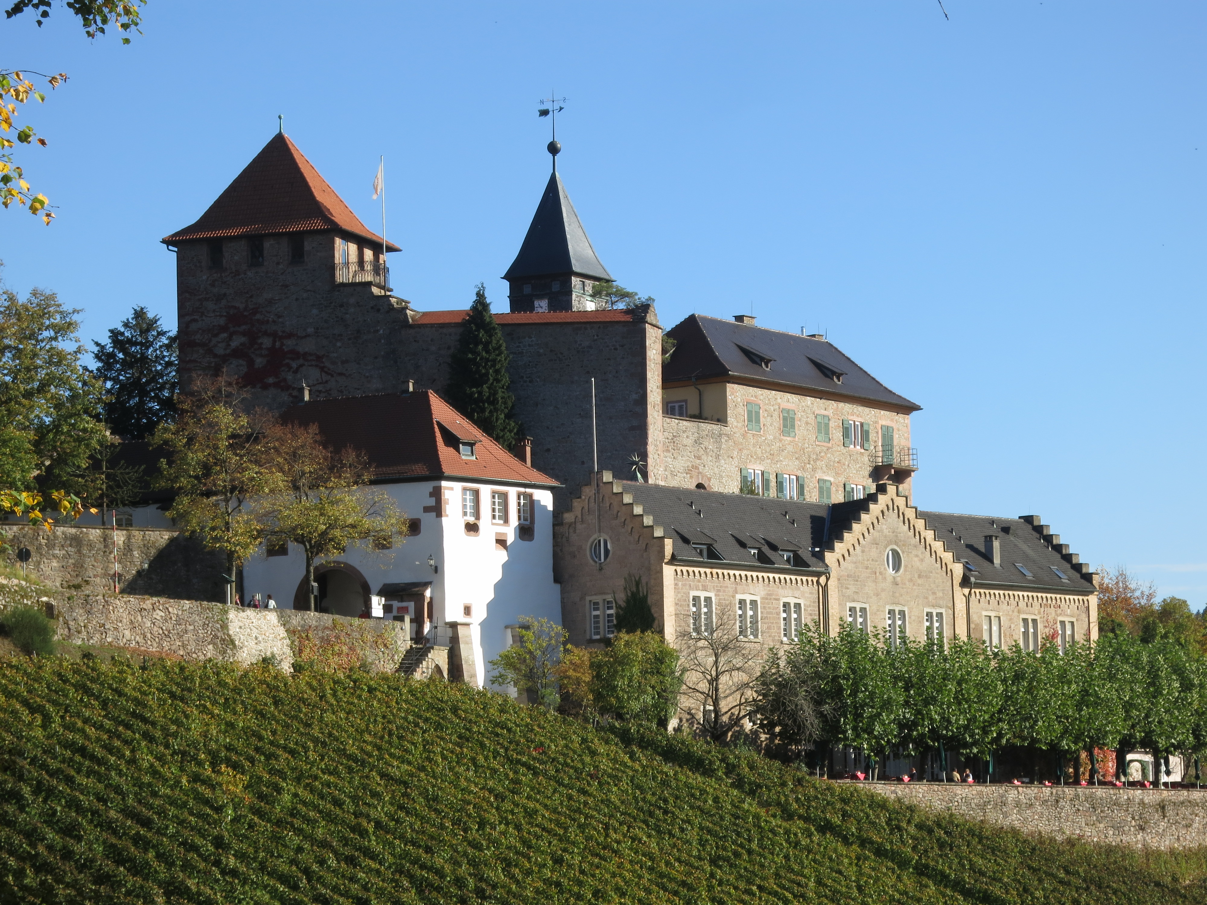 Schloss Eberstein bei Gernsbach im Schwarzwald